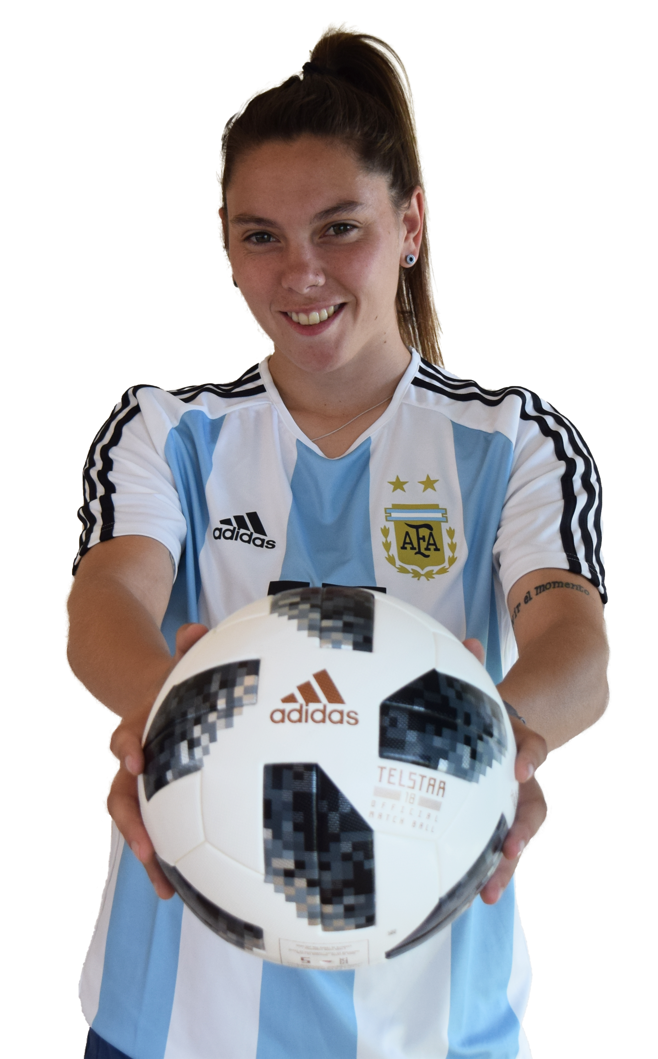 Milagros Menéndez, jugadora de la selección mayor femenina de fútbol de Argentina.Foto sacada previo al primer partido del repechaje por un lugar para el mundial de futbol femenino de Francia 2019